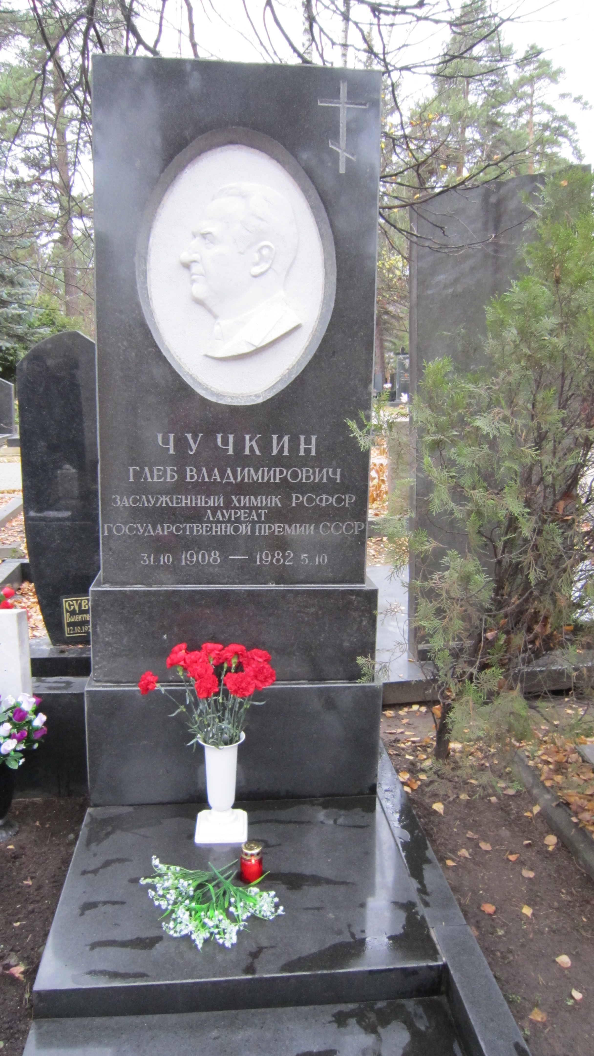 Могила Чучкина Г.В. на Кунцевском кладбище в Москве